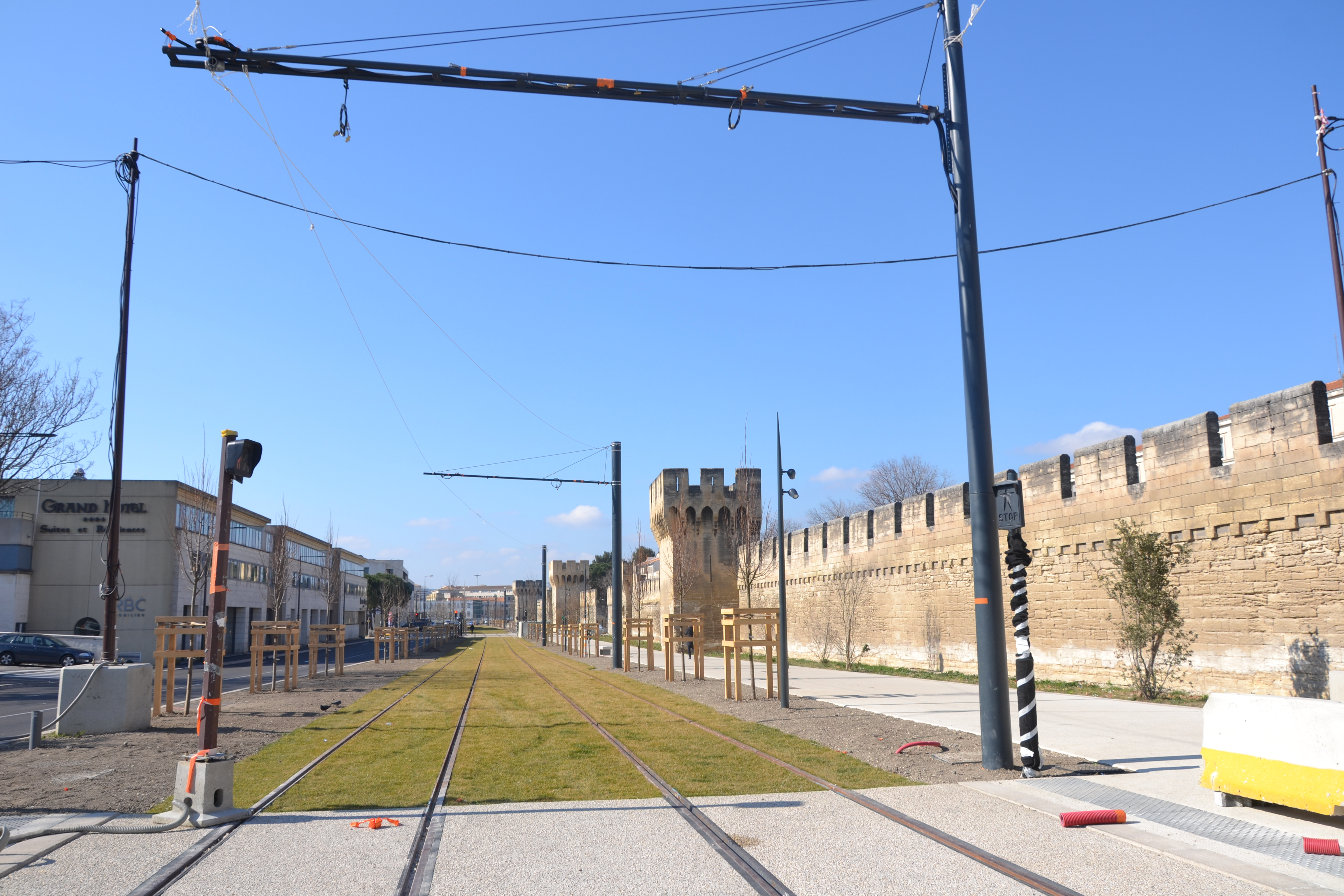 nouvelles voies du Tram d'Avignon